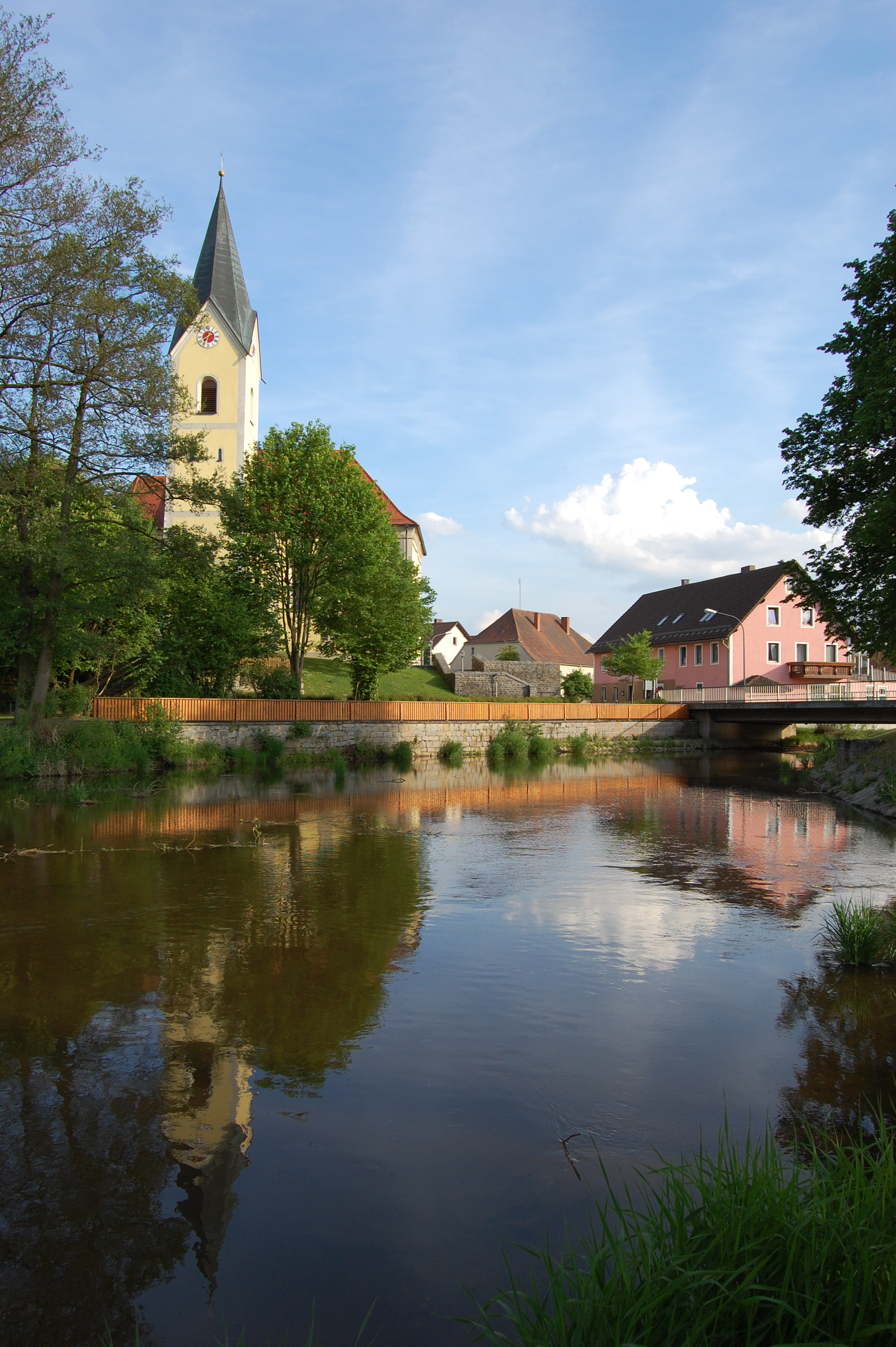 Die Murach im Ort Niedermurach, Landkreis Schwandorf, Oberpfalz, Bayern (2011)